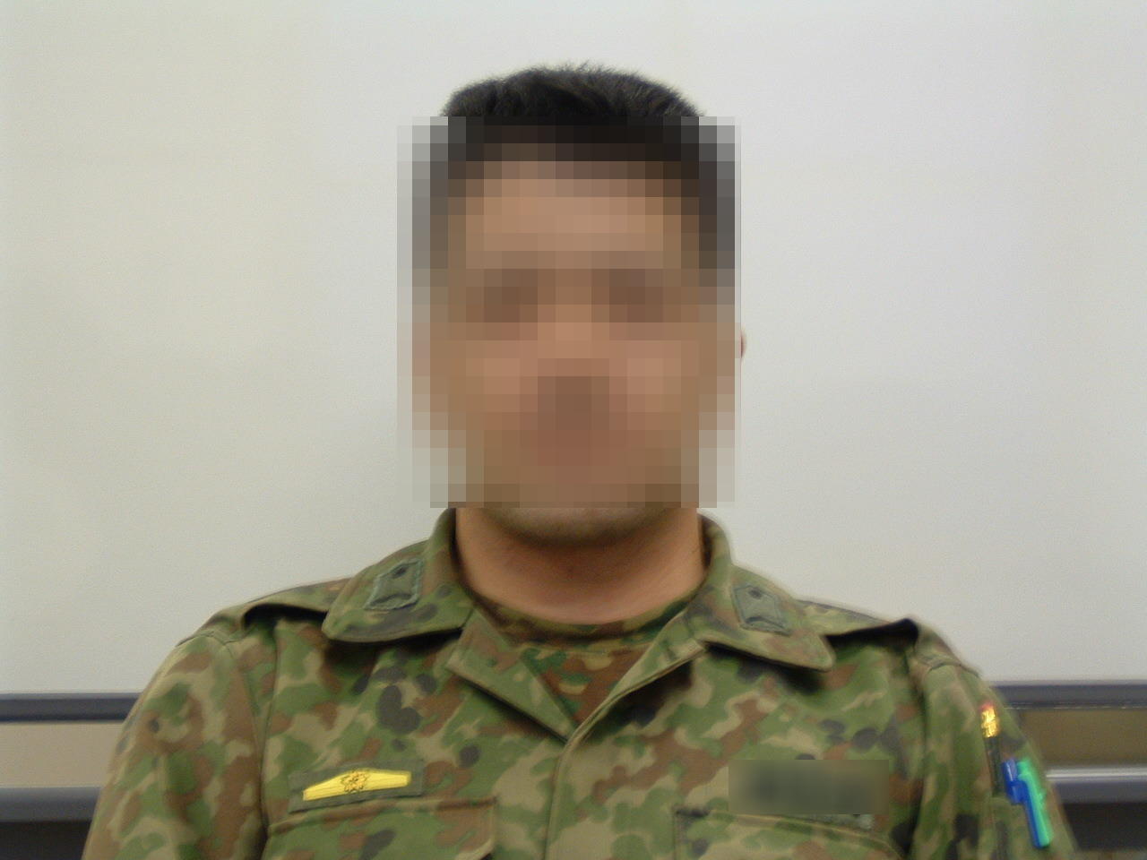 息子につき画像を加工、右胸にあるのが営内班長記章